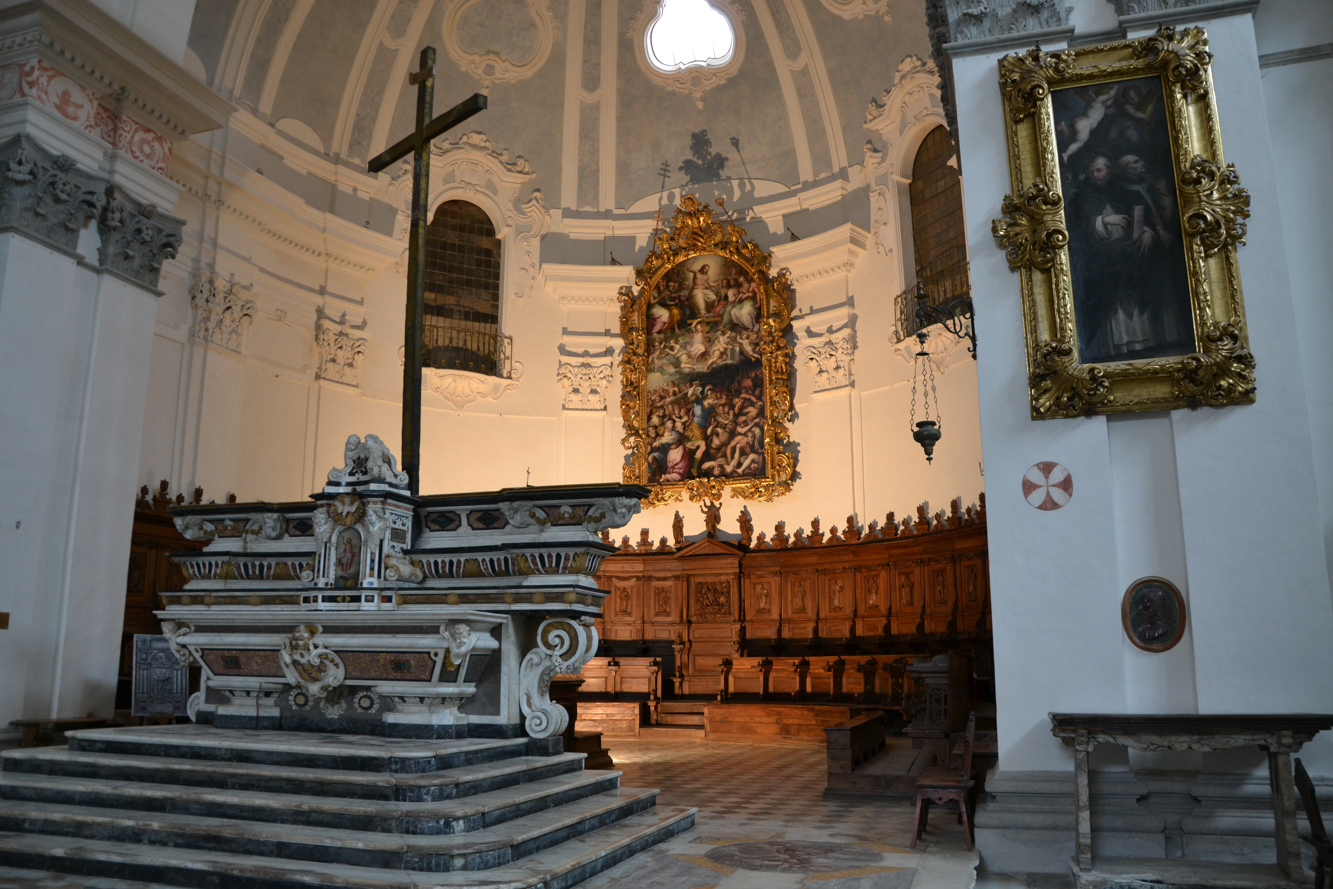 convento domenicano di Santa Croce a Bosco Marengo (AL) realizzato per volontà di papa Pio V nella seconda metà del sec. XVI, nel 1862 divenne riformatorio giovanile fino al 1989.